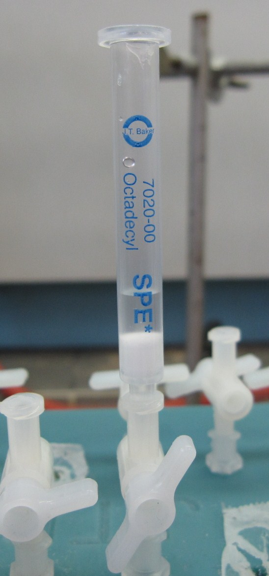 Een SPE kolom in de labzaal universiteit Leiden